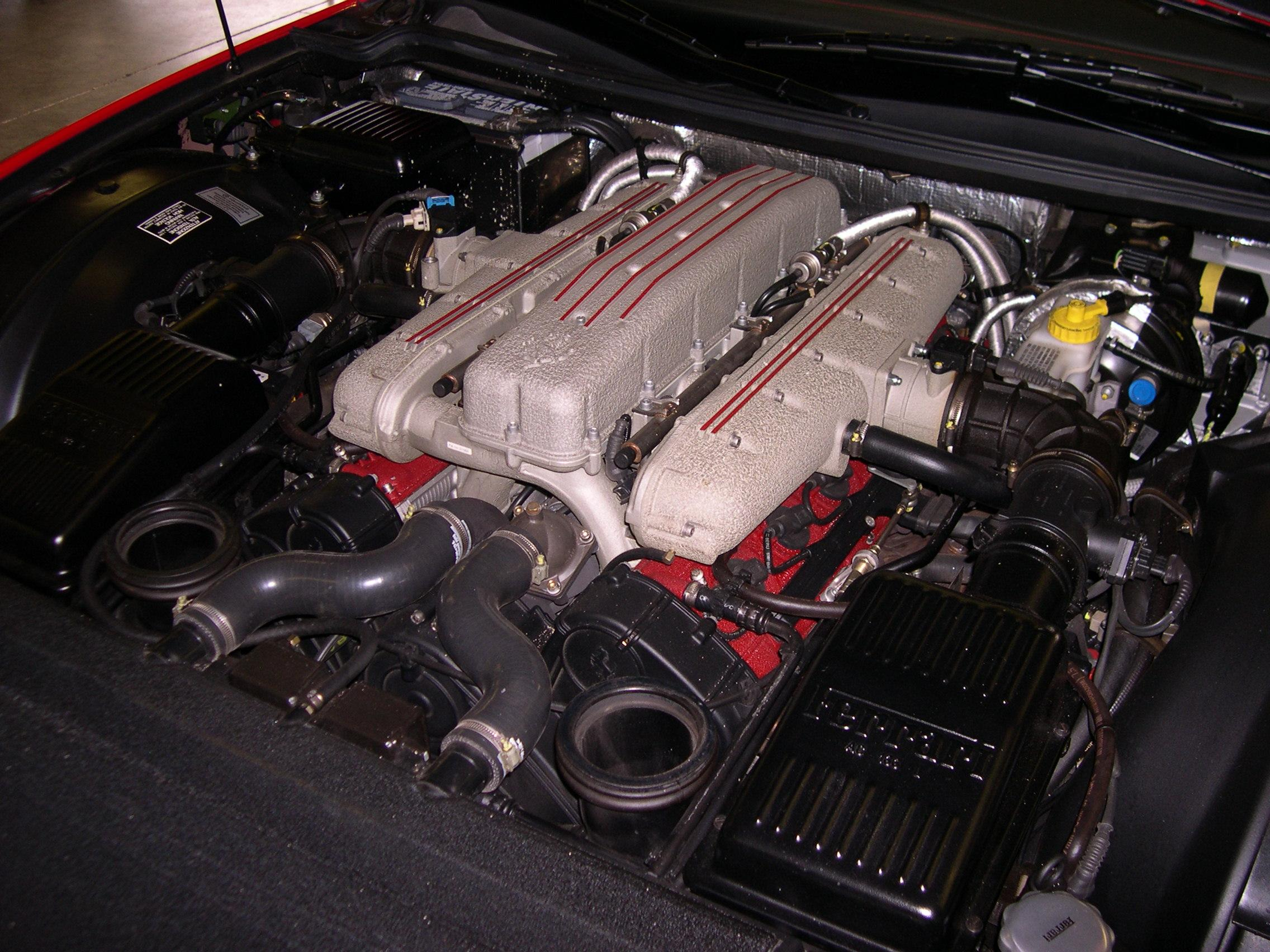 2001 Ferrari 550 V12 engine